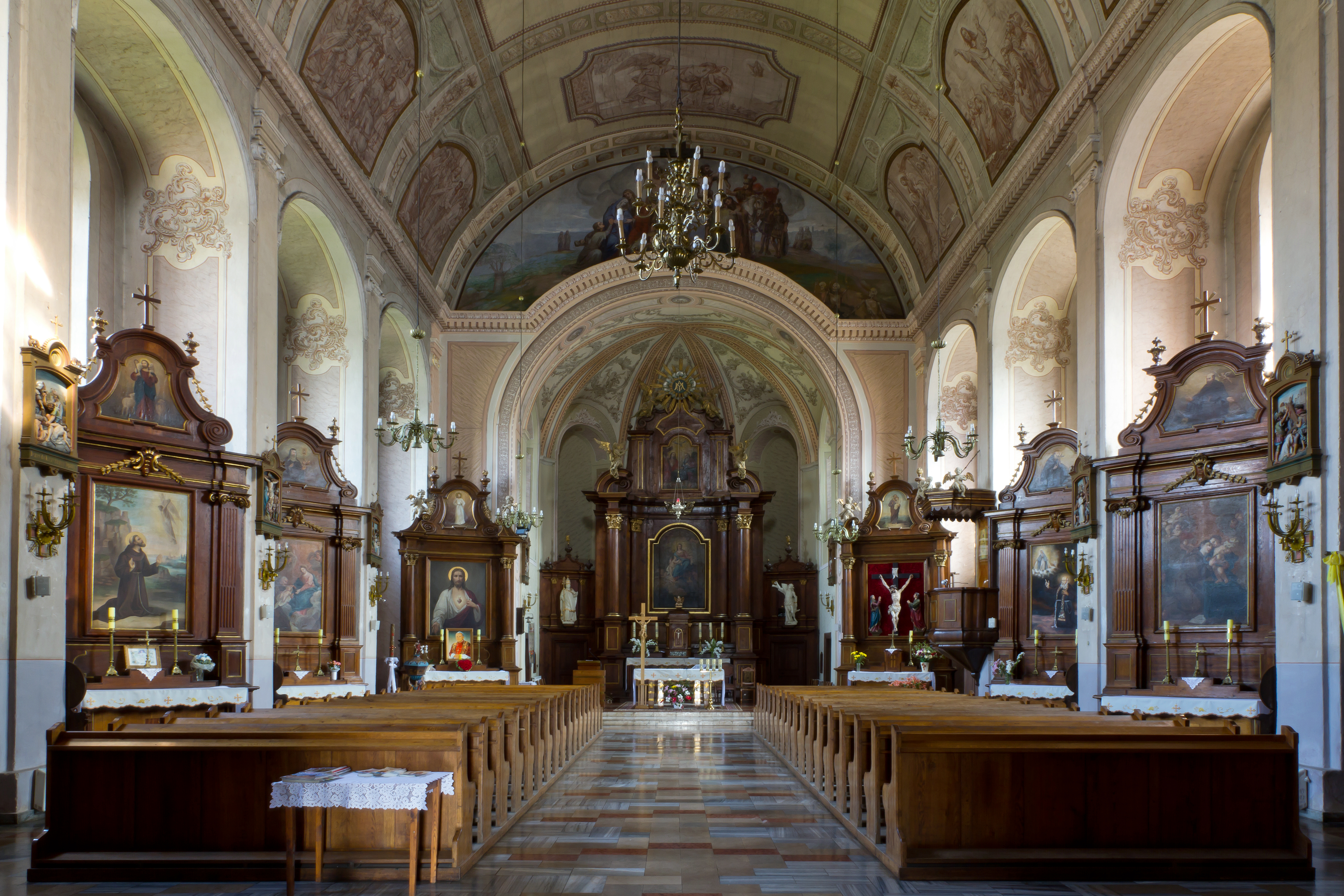 Wnętrze kościoła pod wezwaniem Narodzenia Najświętszej Maryi Panny i Świętego Sebastiana Męczennika w Rywałdzie